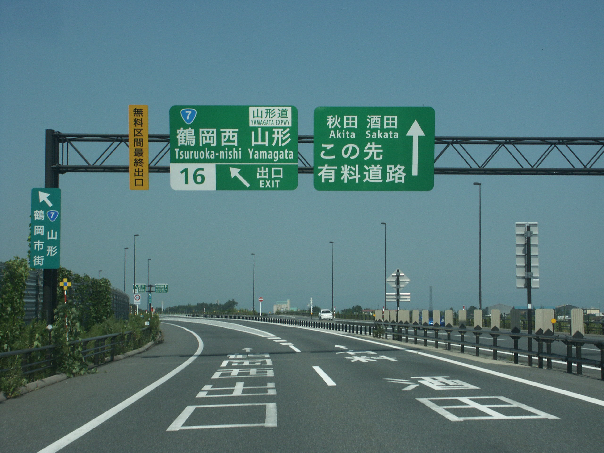 日本海沿岸東北自動車道 鶴岡西IC出口（あつみ温泉IC方面側）